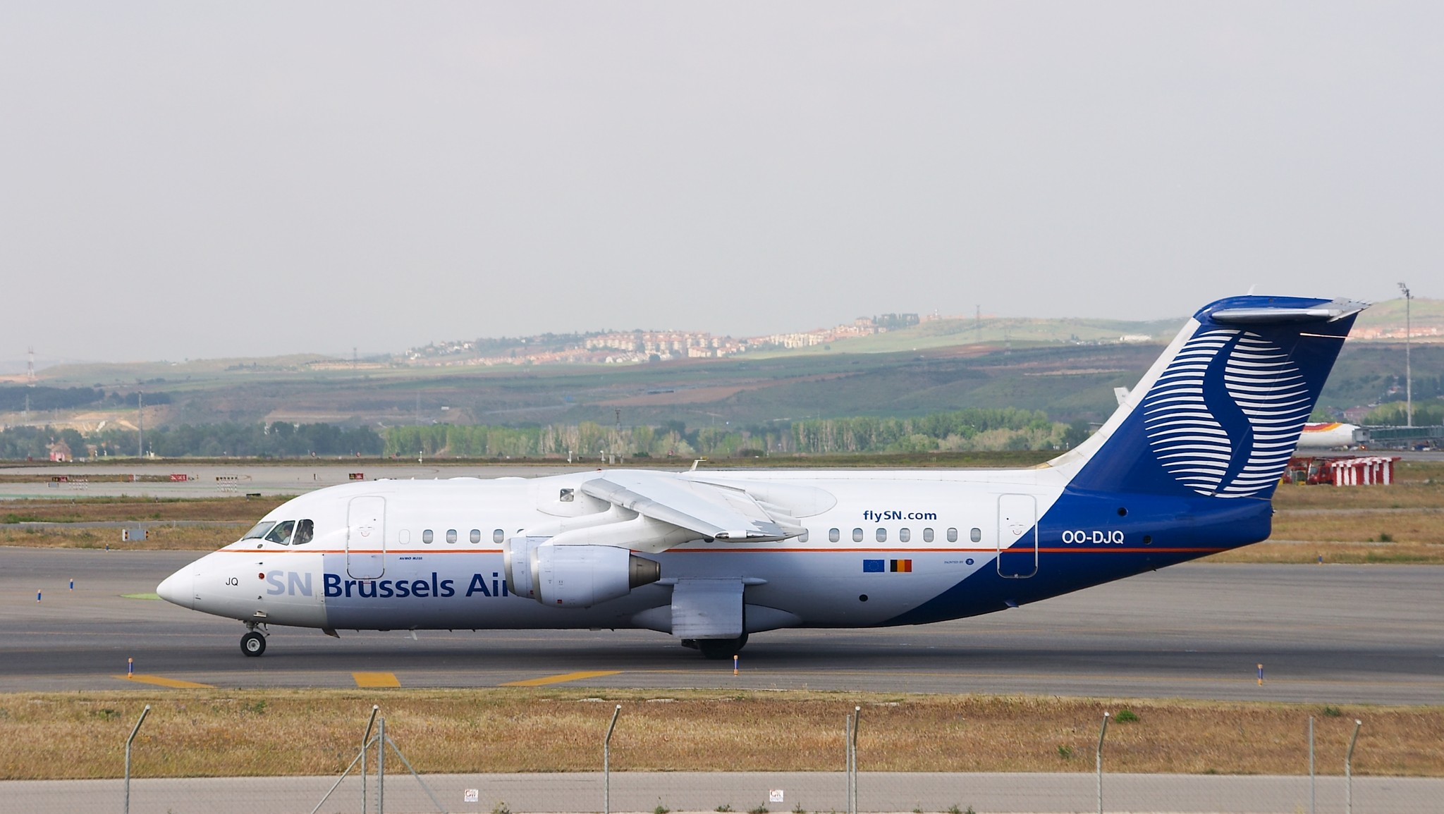 BAE Systems Avro 146-RJ85 de SN Brussels Airlines. Aeropuerto de Madrid Barajas.